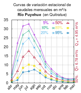 Curvas de variación estacional del río Puyehue en Quitratue. # Dirección General de Aguas # Diagnóstico y clasificación de los cursos y cuerpos de agua según objetivos de calidad. Cuenca del río Toltén. # Santiago de Chile # Ministerio de Obras Públicas (Chile) # 2004 # url: # urlarchivo: # Tabla 4.8: Río Puyehue en Quitratue (m3/s) , pág.48 mes 5% 10% 20% 50% 85% 95% abr 5.55 4.29 3.13 1.72 0.82 0.53 may 22.12 17.10 12.45 6.65 2.83 1.56 jun 31.61 26.79 21.84 14.55 8.44 5.90 jul 32.72 29.01 24.82 17.67 10.22 6.44 ago 26.84 23.31 19.65 14.17 9.48 7.48 sep 20.49 17.70 14.82 10.55 6.95 5.43 oct 11.85 10.30 8.67 6.21 4.03 3.04 nov 7.71 6.55 5.37 3.68 2.31 1.76 dic 4.96 4.27 3.55 2.45 1.48 1.04 ene 3.04 2.62 2.18 1.51 0.92 0.65 feb 2.31 1.97 1.61 1.07 0.59 0.38 mar 2.47 2.08 1.68 1.07 0.52 0.28 This plot was created with Gnuplot.